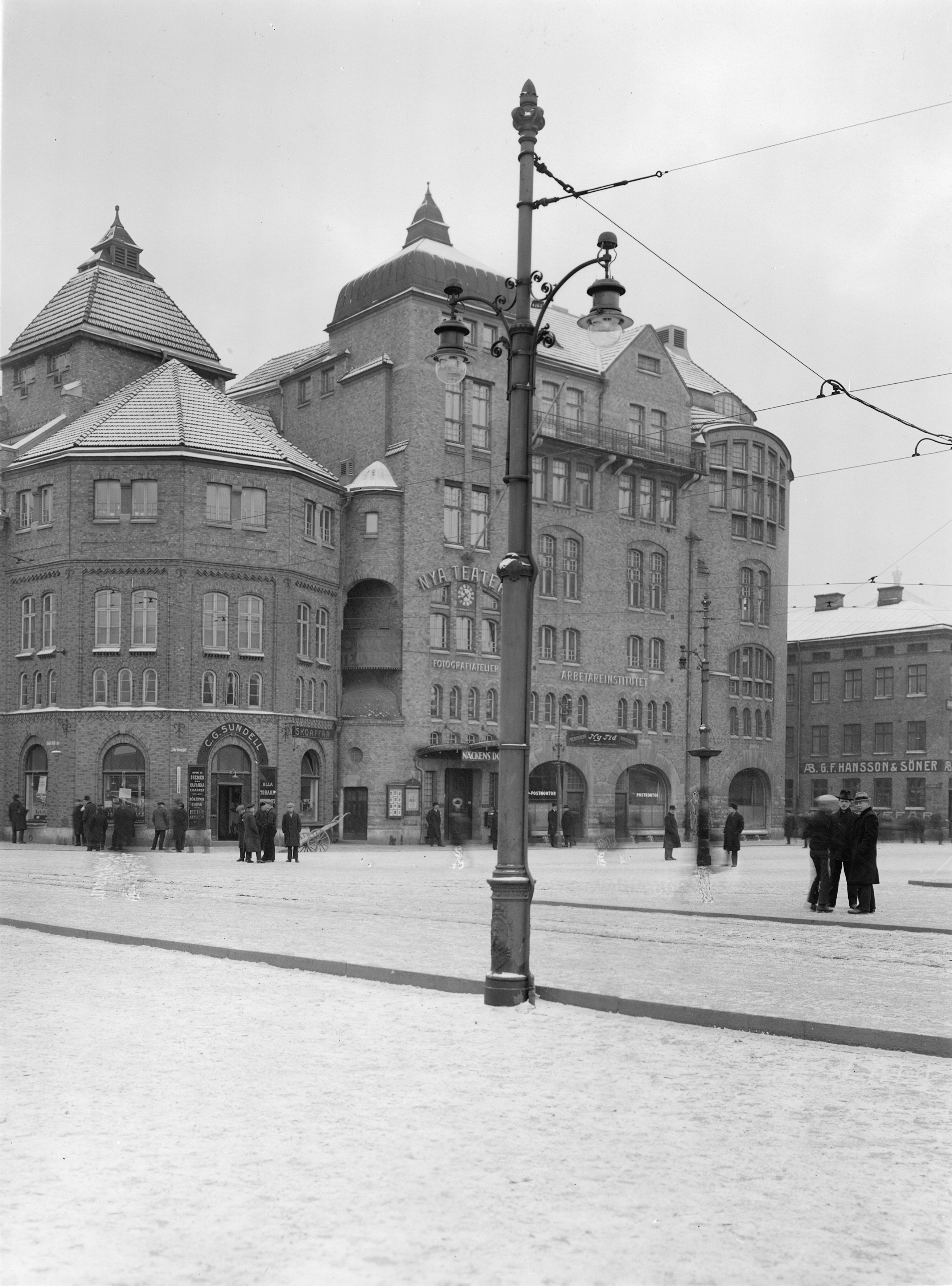 Gatubelysning i Göteborg. Lyktstolpe framför Nya Teatern och Arbetareinstitutet.